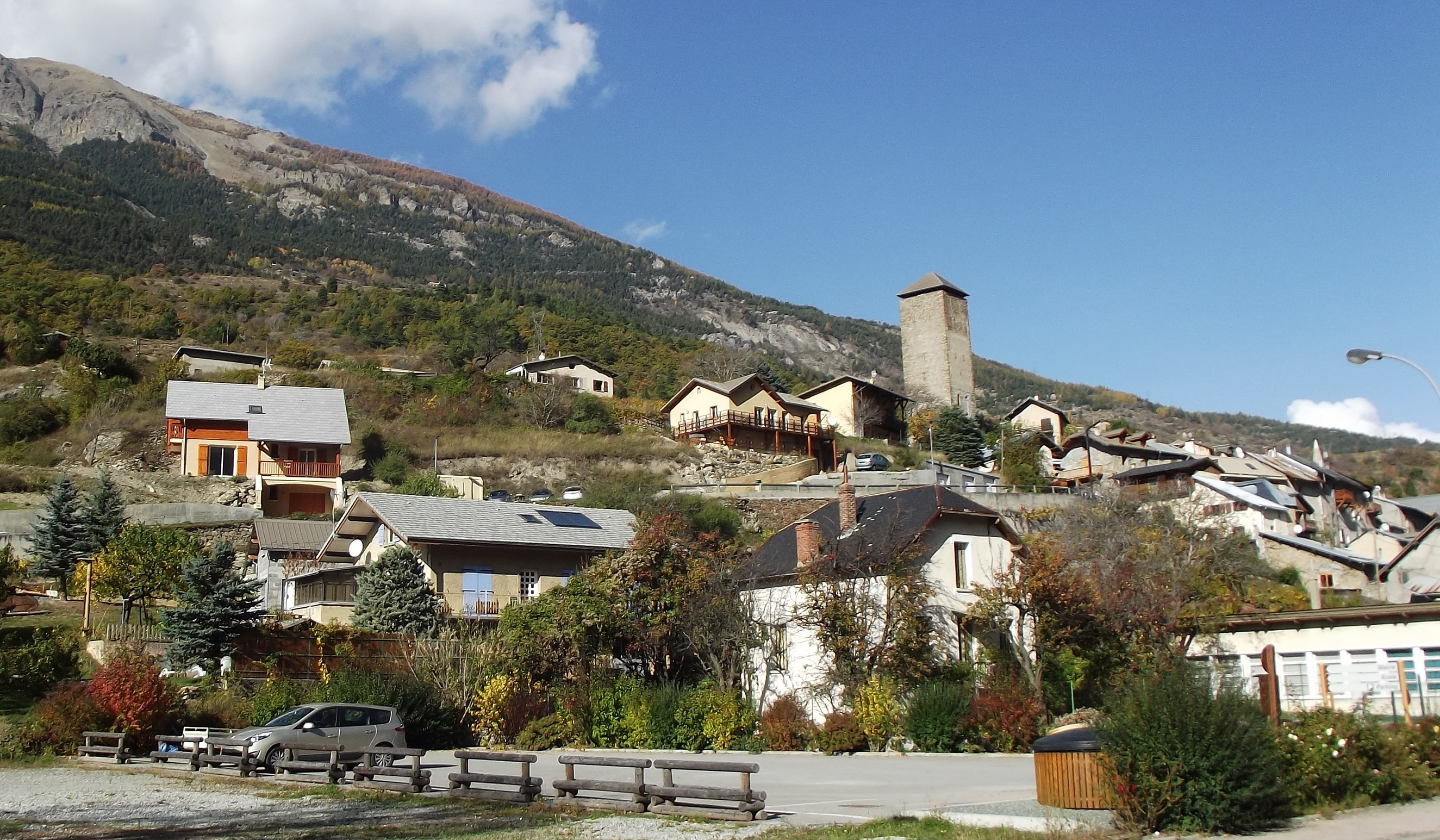 Bourg de Saint-Clément-sur-Durance